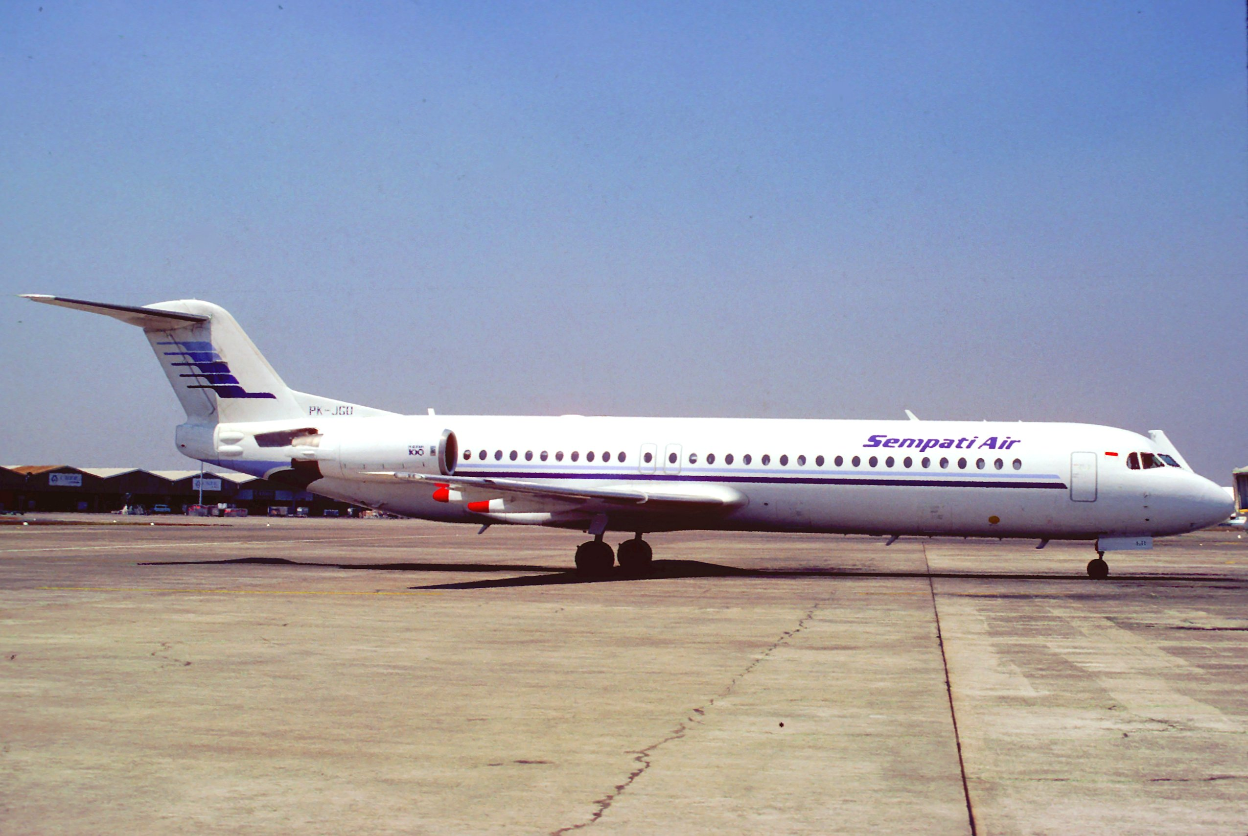 Sempati Air Fokker 100; PK-JGB, September 1994